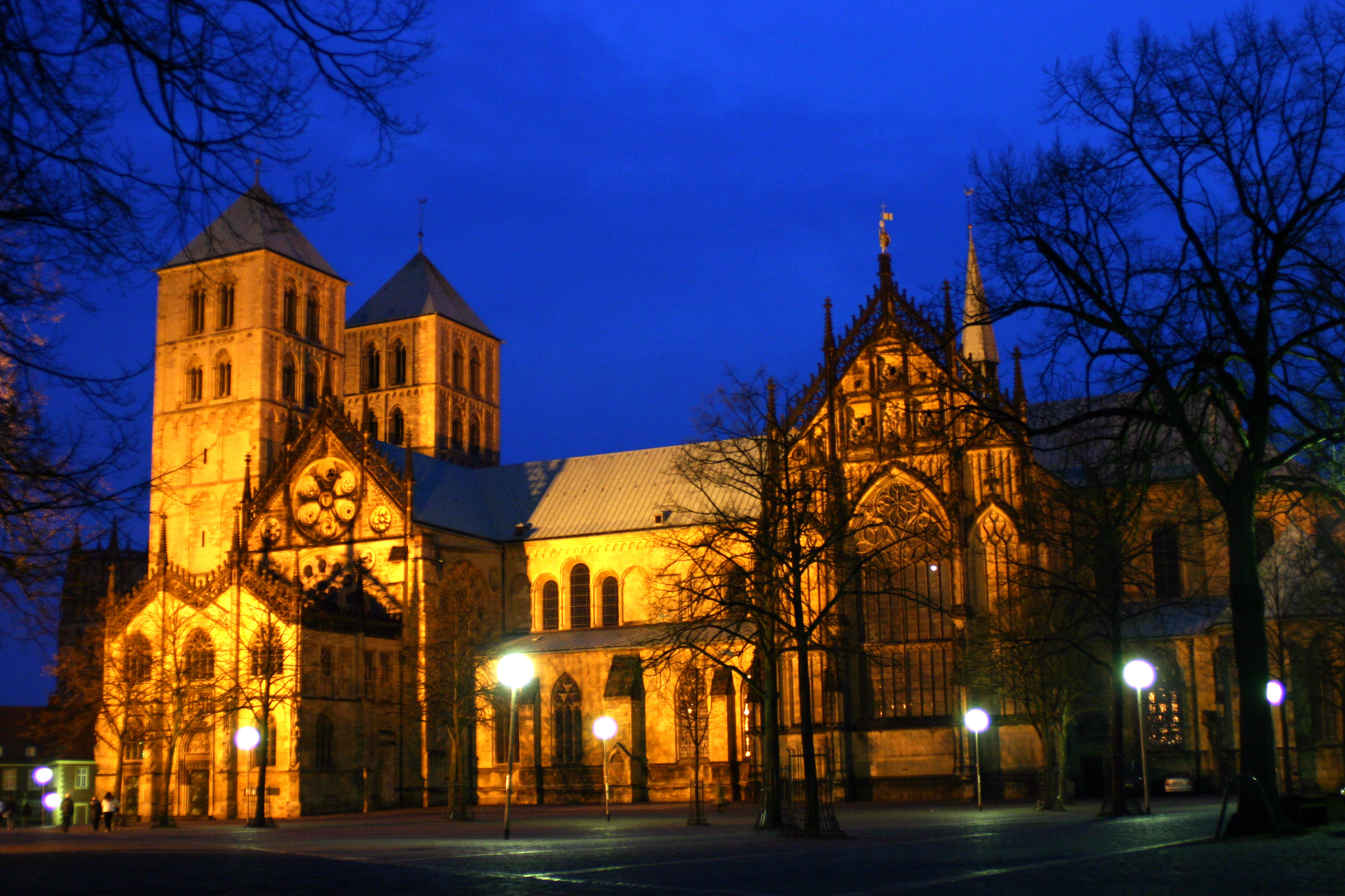 Der St.-Paulus-Dom ist der bedeutendste Kirchenbau in Münster